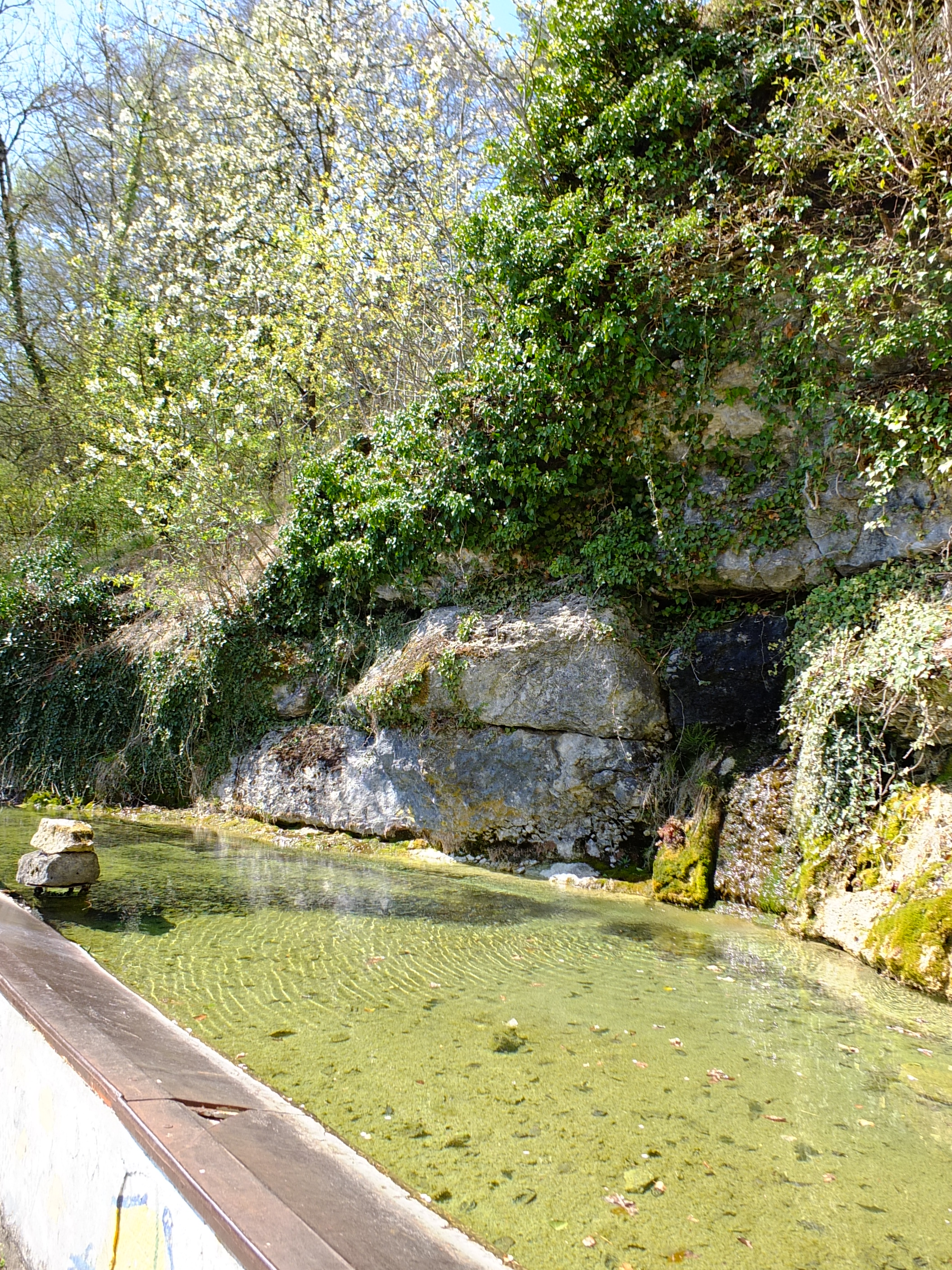 La fontaine de Villouxel